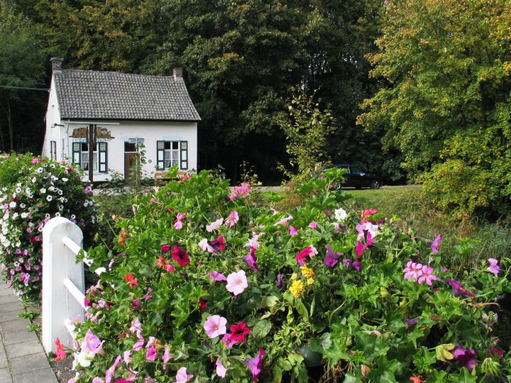 Brugwachtershuis aan een oude arm van de Zuid-Willemsvaart te Lanklaar.